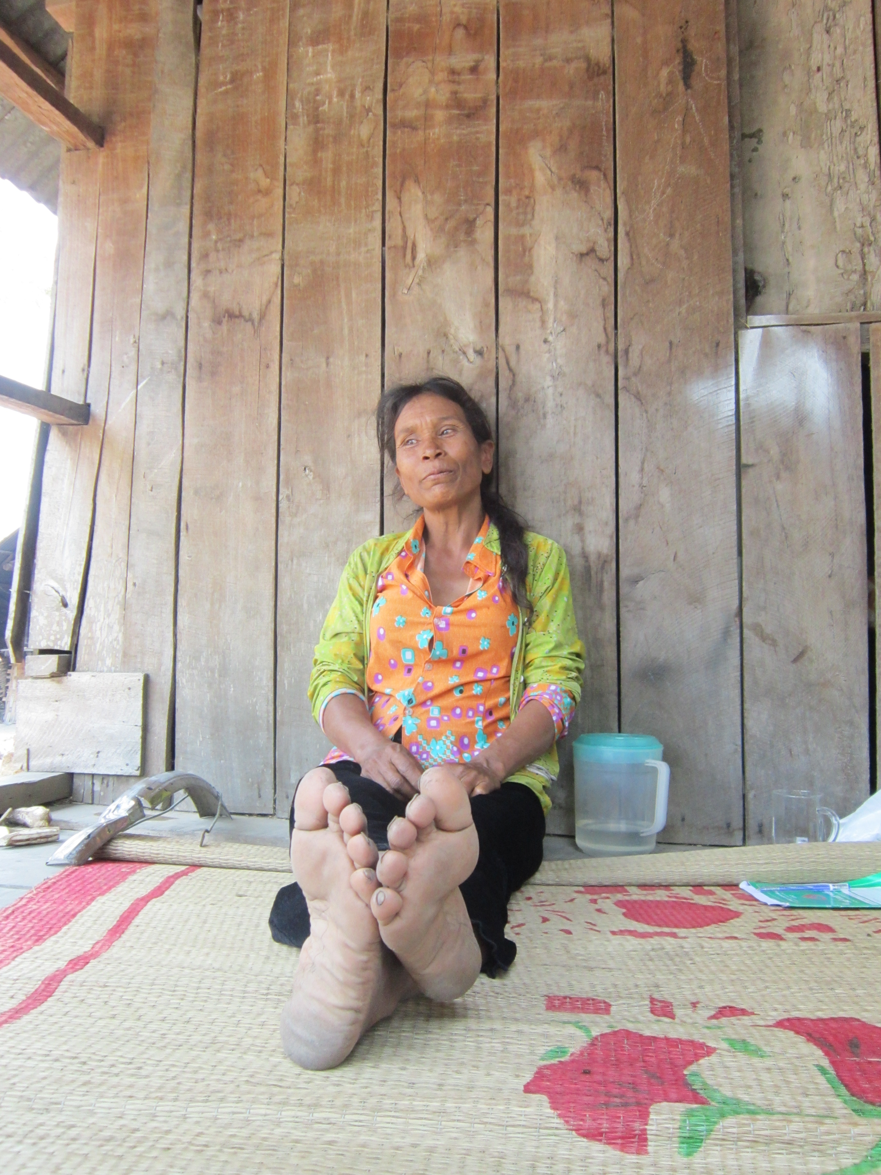 Bà H'kuan Krũk kể chuyện Đá Voi